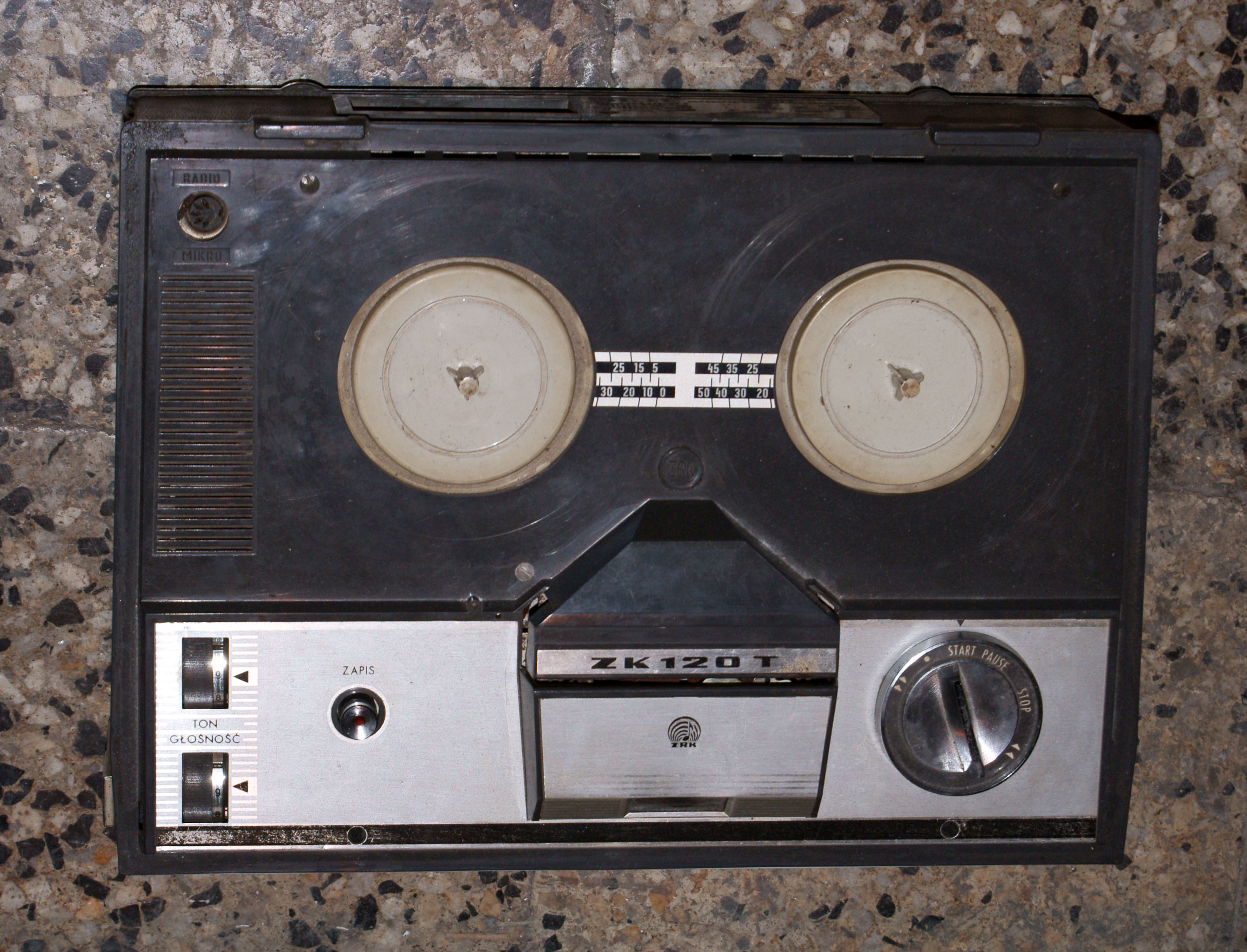 Magnetofon szpulowy ZK120T. Wystawa Prywatnego Muzeum Motoryzacji i Techniki w wytwórni Wódek Koneser.